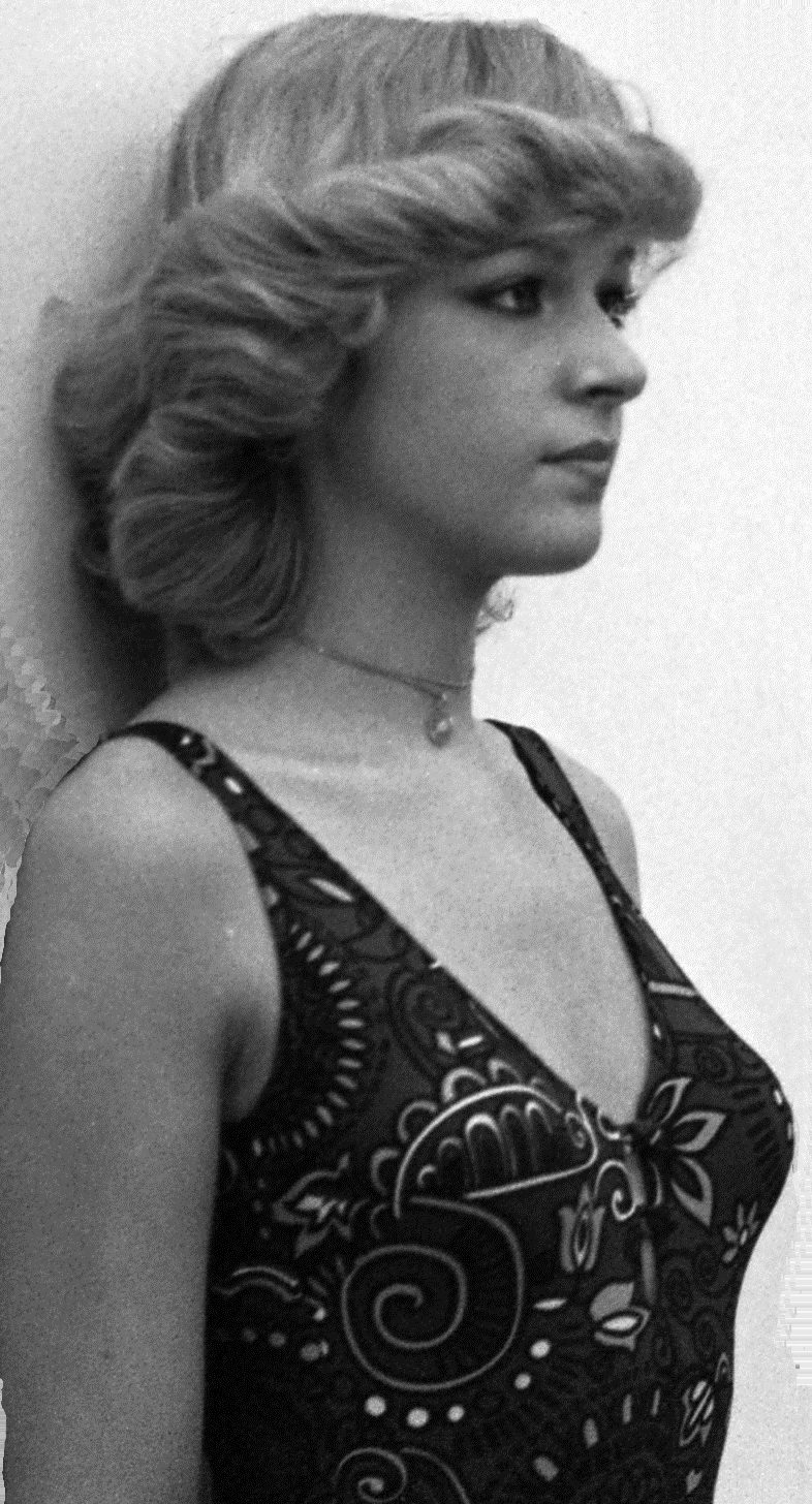 Manökenjelöltek felvételi vizsgája, Csengeri Szilvia.